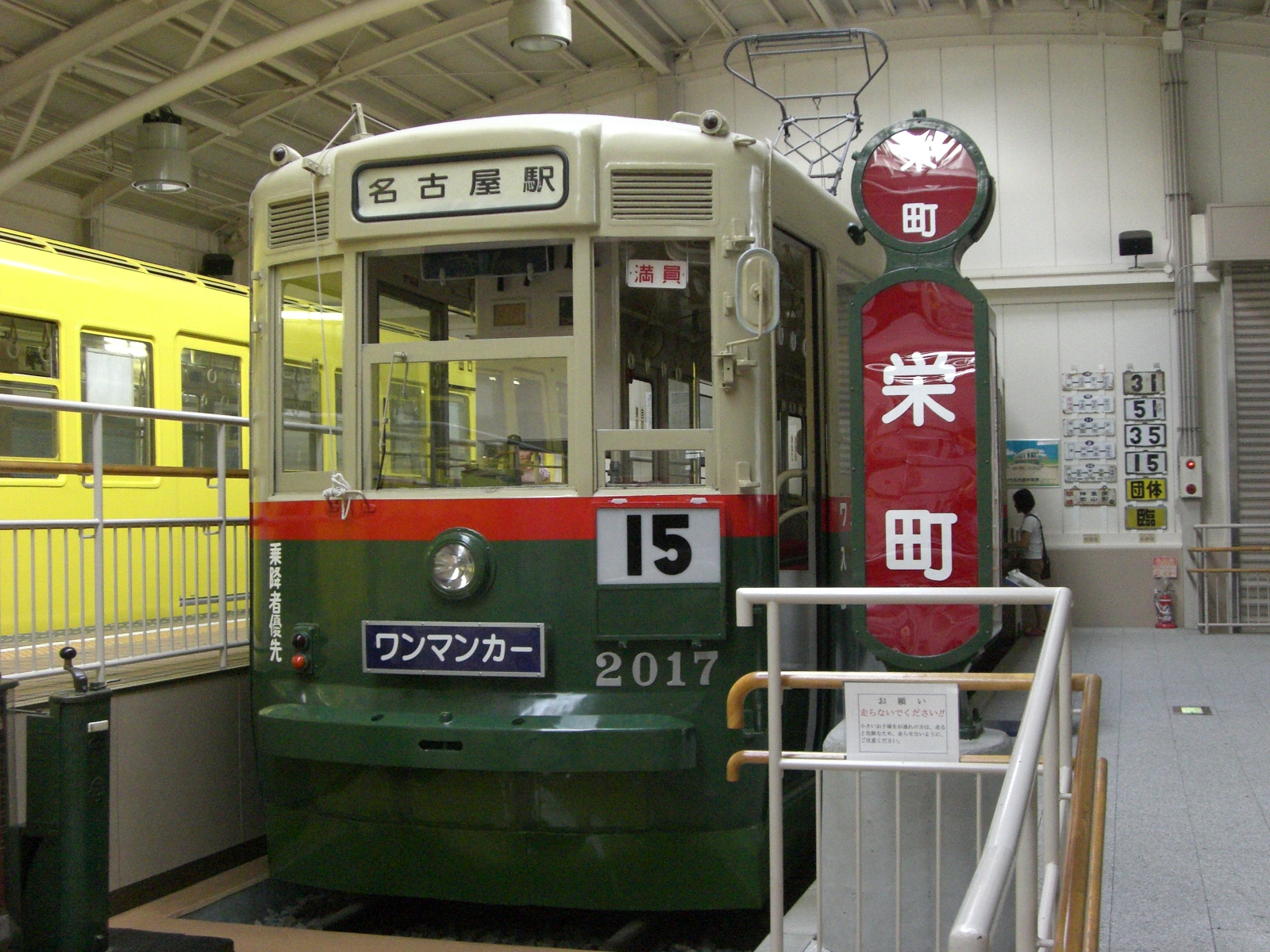 名古屋市電2017(レトロ電車館）